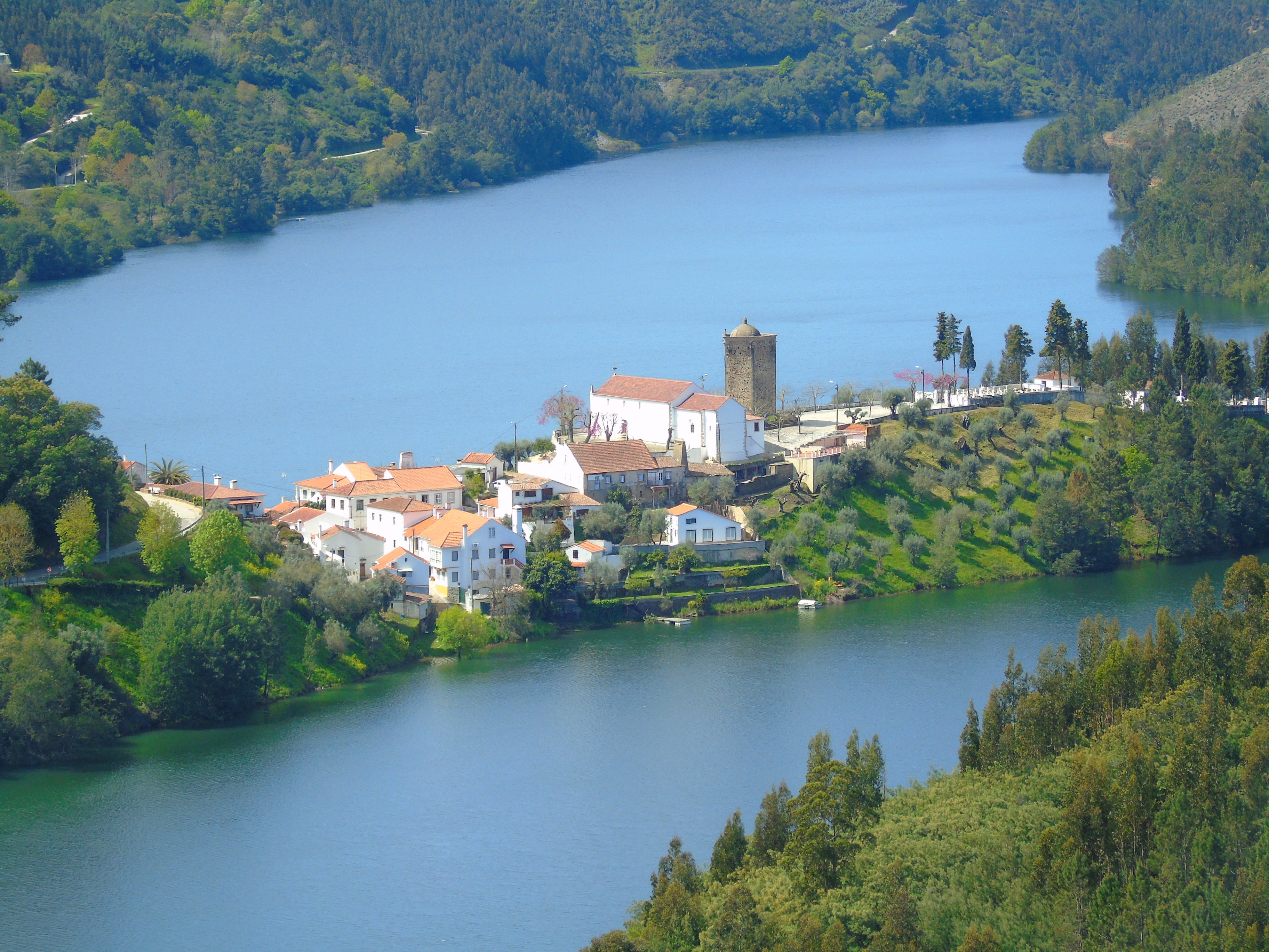 Fotografia da península de Dornes, captada desde a serra em Casal de Ascenso Antunes.